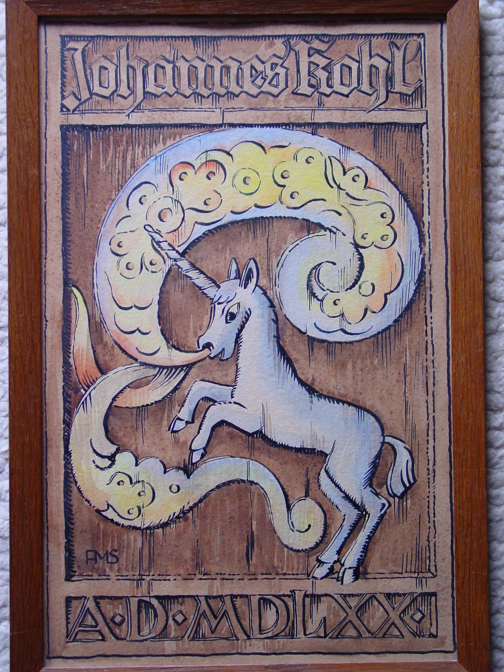 Das alte Wahrzeichen der Einhorn-Apotheke Darmstadt zeigt das Einhorn mit einer Wolke aus Heildampf